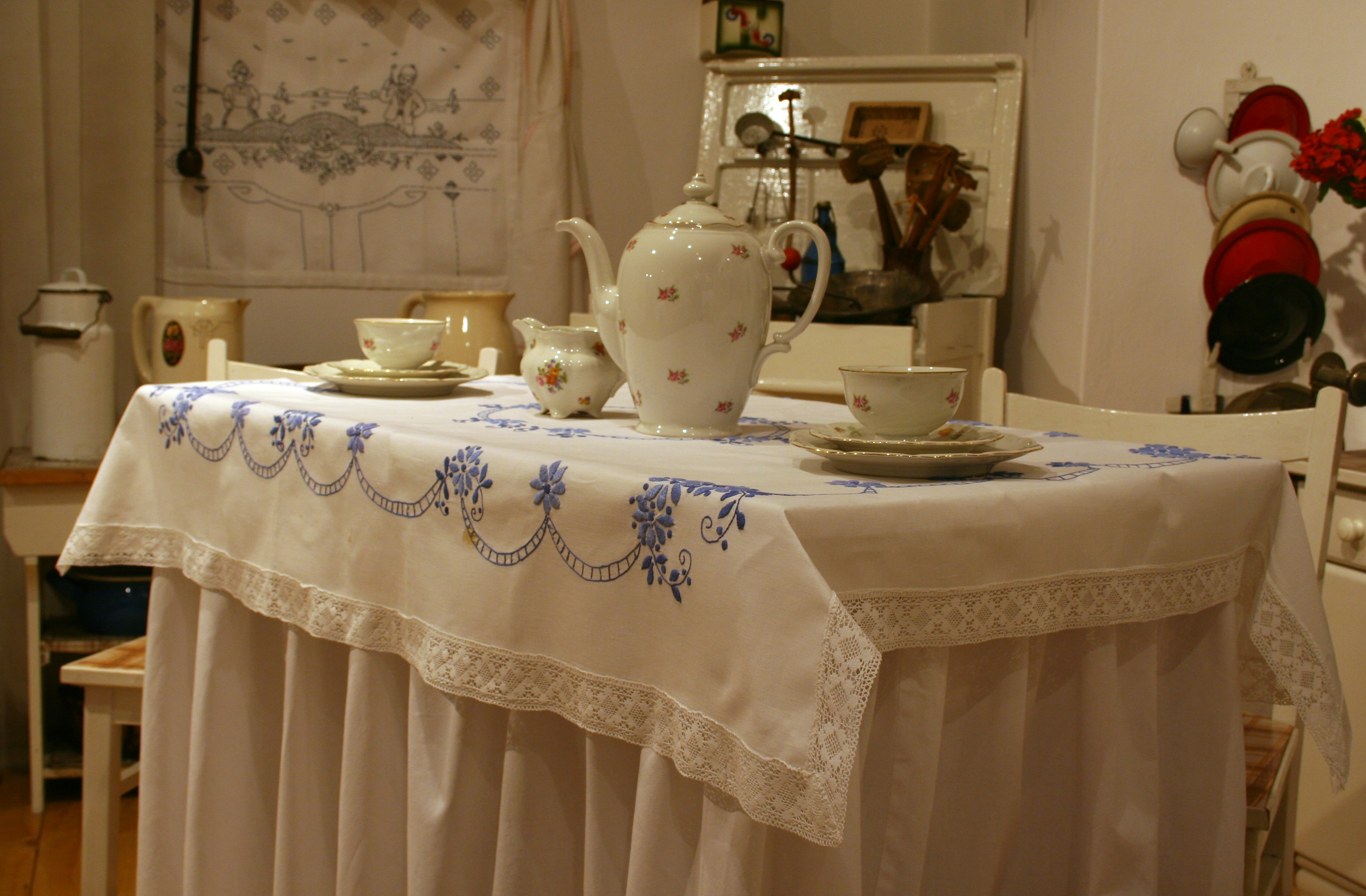 Muzeum w Rybniku podczas Nocy Muzeów. Stół i fragment kuchni.